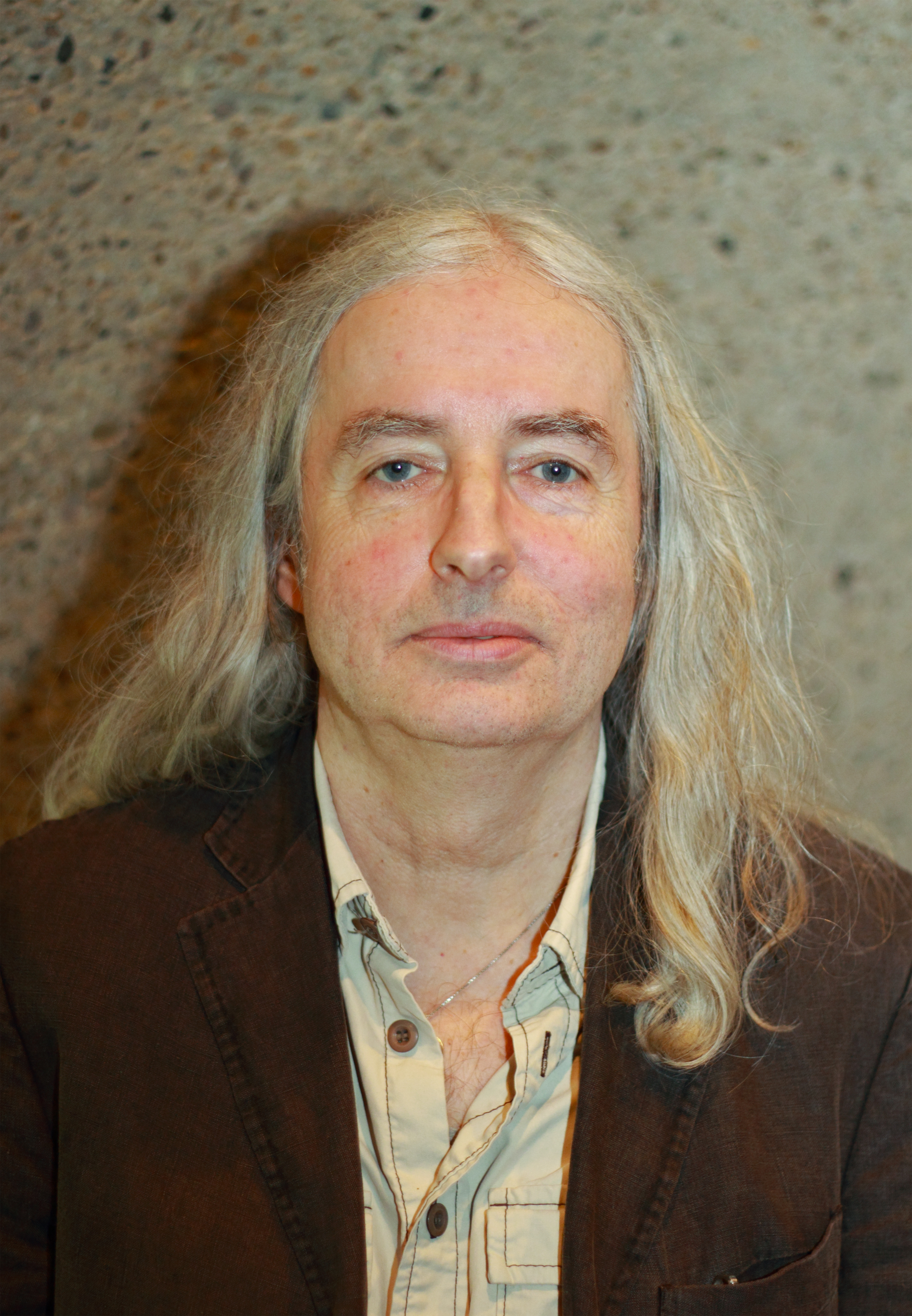 Verleihung des Schallwelle-Musikpreises am 10. März 2012. Foyer des Planetariums Bochum. Heinz «Gandalf» Strobl.